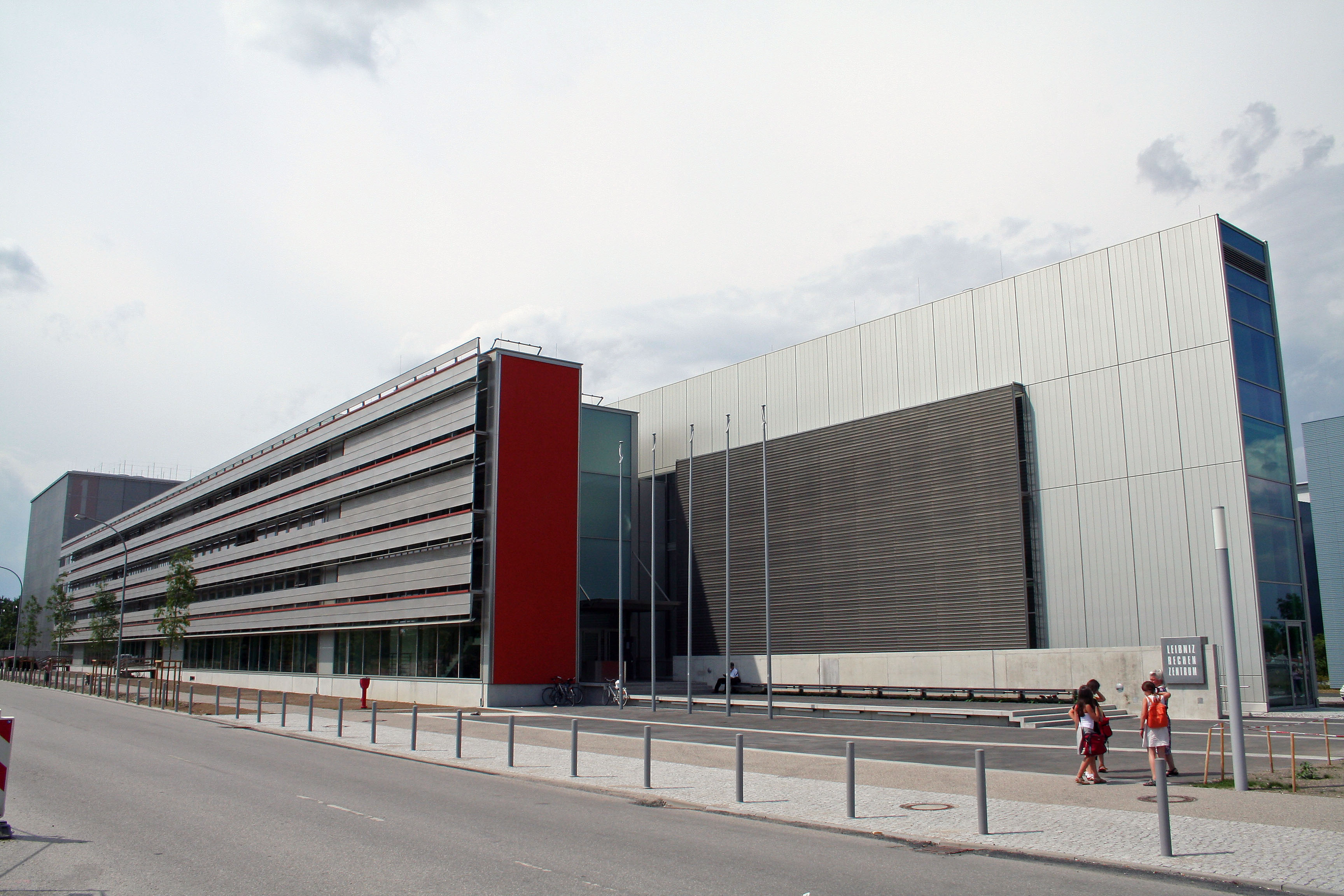 Eingangsbereich des Leibniz-Rechenzentrum in Garching bei München.